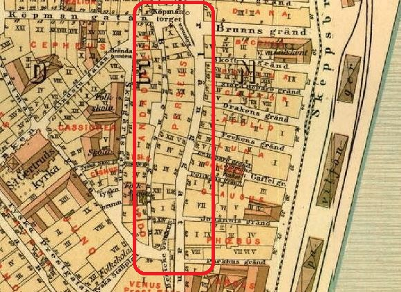 Del av Lundgrens Stockholmskarta från 1885 visande kvarteret Perseus